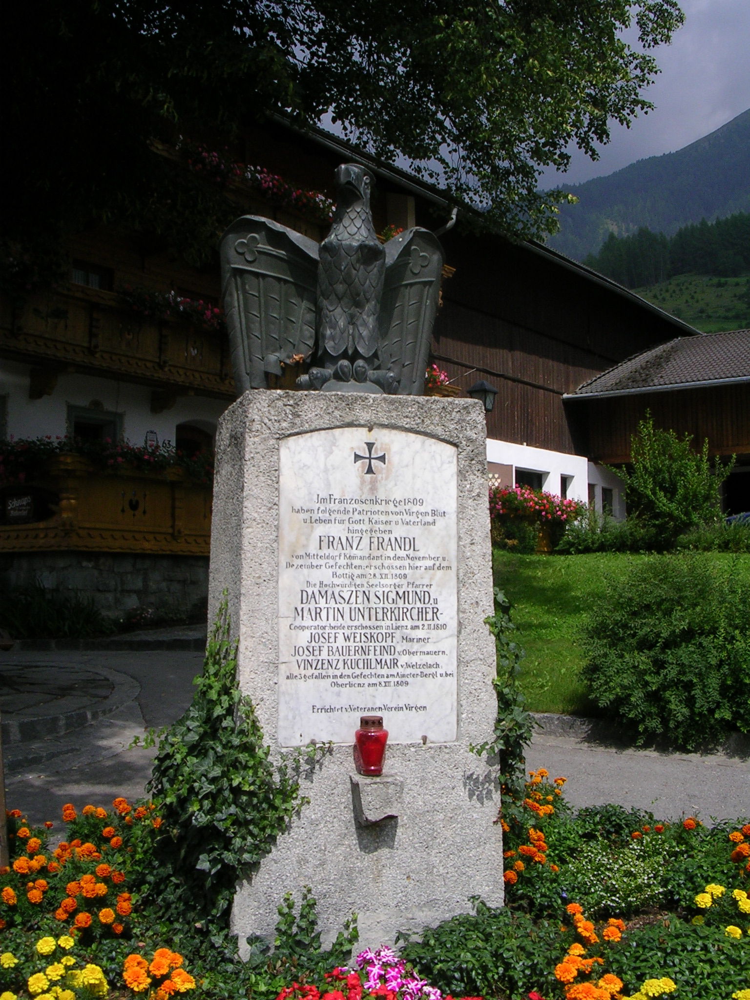 Denkmal für die Opfer der Koalitionskriege in VirgenInschrift: Im Franzosenkrieg 1809 haben folgende Patrioten von Virgen Blut u. Leben für Gott Kaiser u. Vaterland hingegeben FRANZ FRANDL von Mitteldorf Komandant in den November u. Dezember Gefechten; erschossen hier auf dem Bottig am 28. XII. 1809 Die Hochwürdigen Seelsorger Pfarrer DAMASZEN SIEGMUND u. MARTIN UNTERKIRCHER- Cooperator; beider erschossen in Lienz am 2. II. 1810 JOSEF WEISKOPF, Mariner JOSEF BAUERNFEIND v. Obermauern VINZENZ KUCHLMAIR v. Welzelach alle 3 gefallen in den Gefechten am Aineter-Bergl u. bei Oberlienz am 8. XII. 1809 errichtet v. Veteranen-Verein Virgen This media shows the remarkable cultural object in the Austrian state of Tyrol listed by the Tyrolean Art Cadastre with the ID 16215. (on tirisMaps, pdf, more images on Commons, Wikidata)